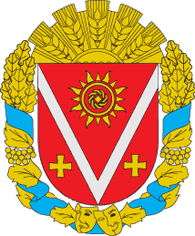 Герб Кропивницького району Кіровоградської області